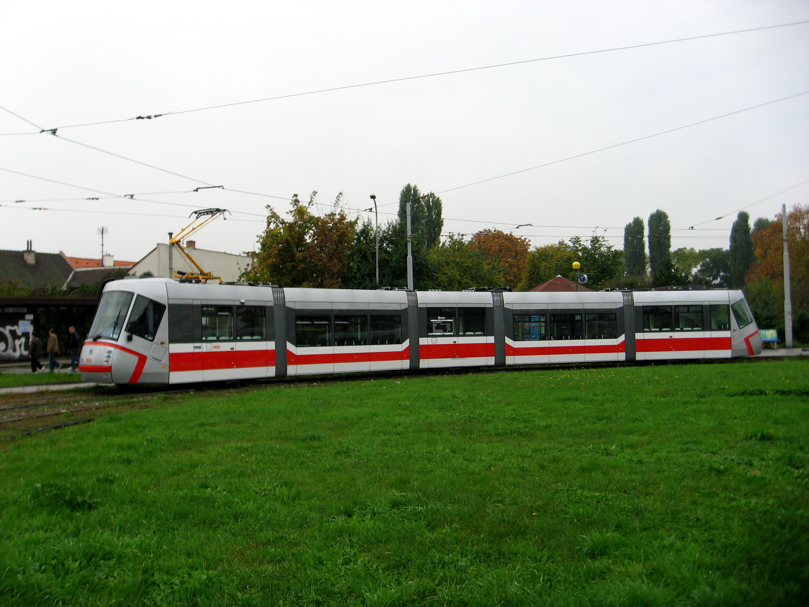 Tramvaj č. 1905